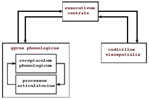 Secundum Alanum Baddeley memoriae operativae exemplar.